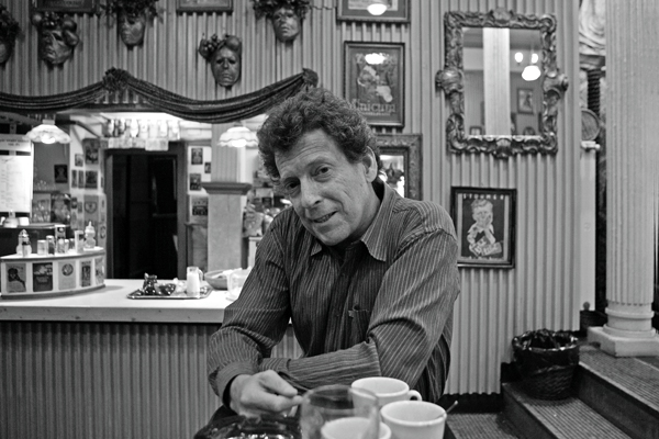 Békés Pál (1956–2010) író, drámaíró, műfordító.